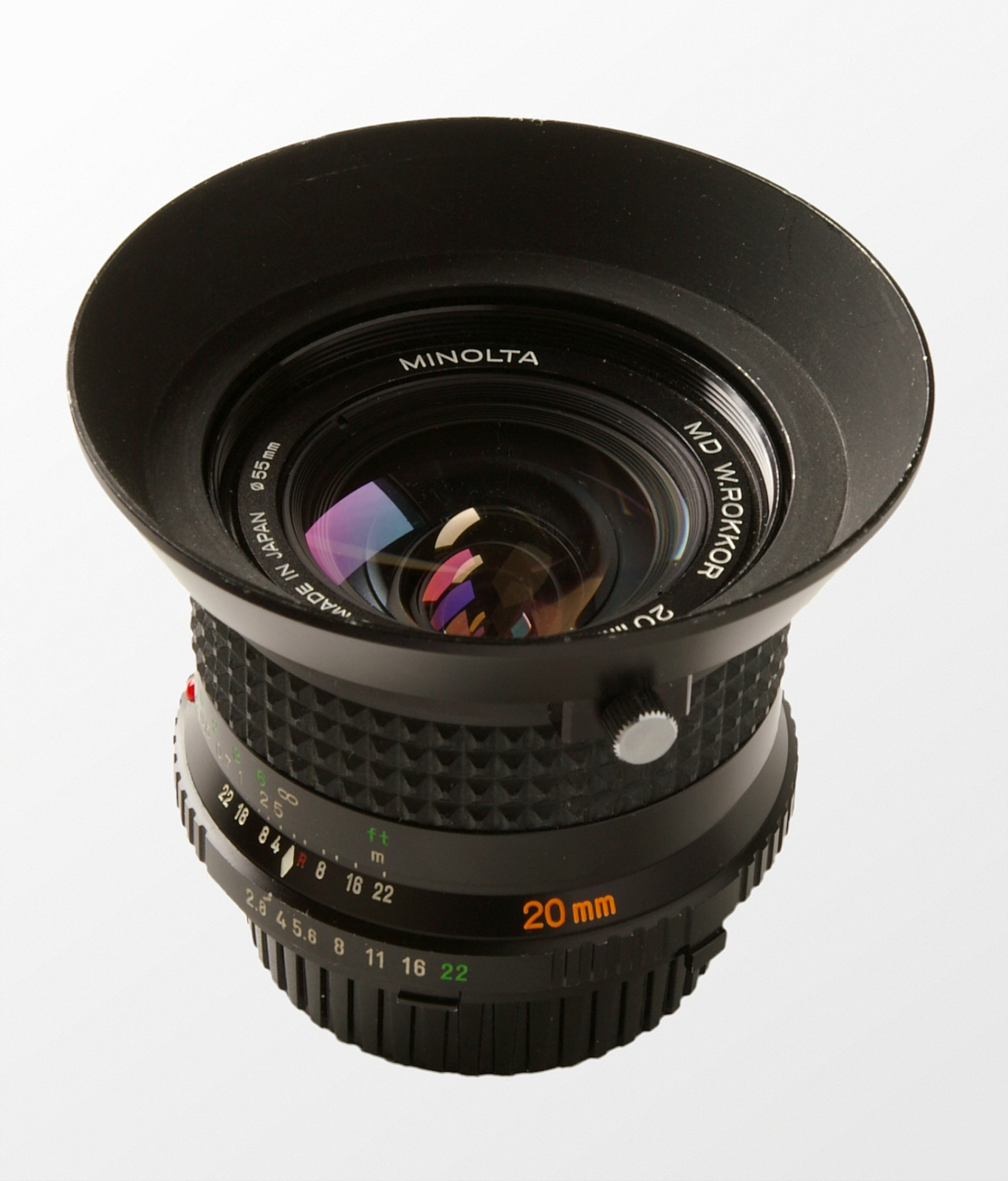 Minolta MD 2,8/20 mm. Weitwinkelobjektiv für manuelle Spiegelreflexkameras der Firma Minolta mit dem SR-Bajonett. Offenblendenmessung mit Modellen mit Blendenkupplung (z.B. SRT-, XG- und XE Serie), Blenden- und Programmautomatiken bei entsprechend ausgestatteten Kameras mit MD-Kupplung (z.B. XD- und X-Serie) möglich.